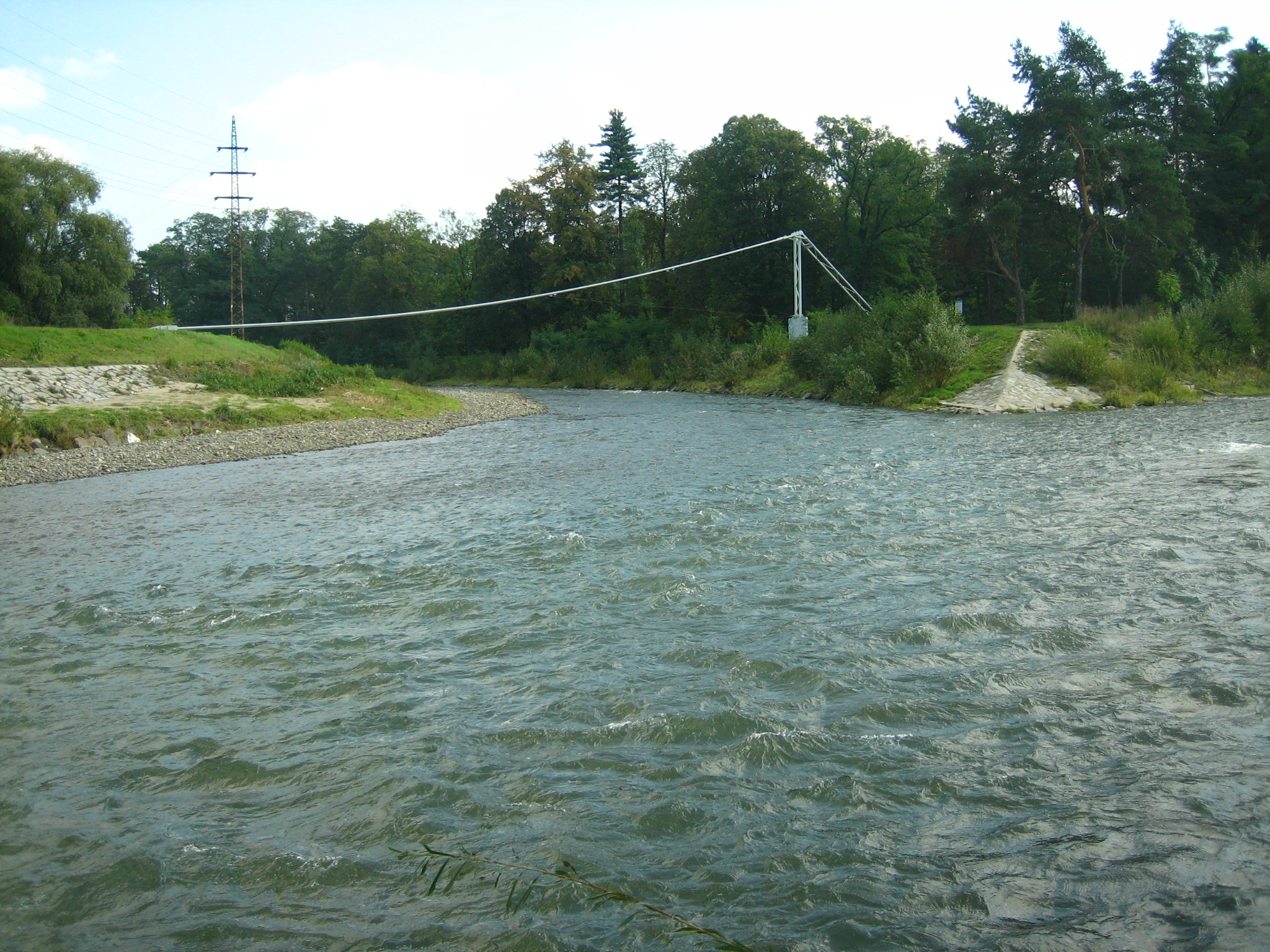 Vsetínská Bečva soutok s Rožnovskou Bečvou ve Valašském Meziříčí